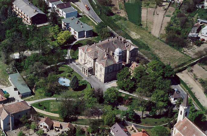 Mansion in Nagylózs, Hungary